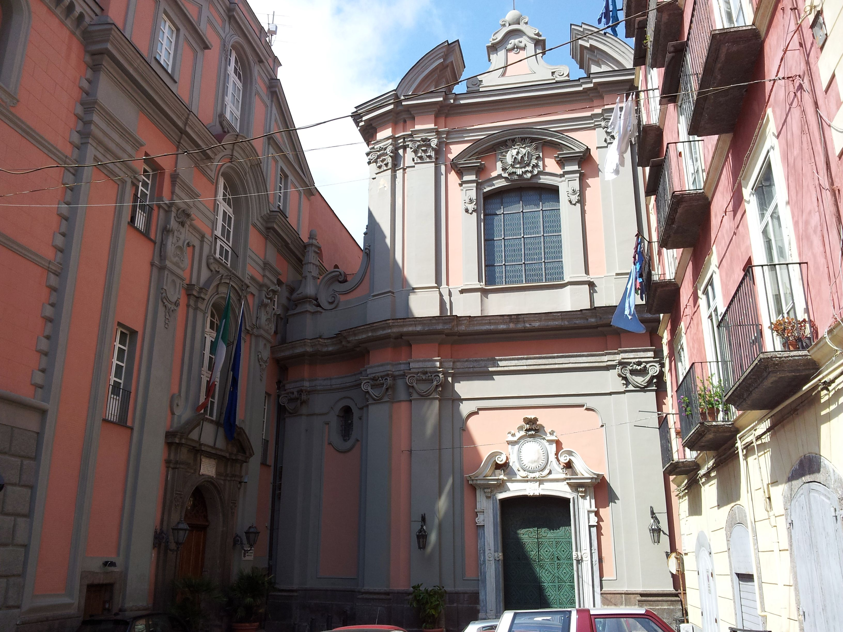 Chiesa della Nunziatella (Napoli)